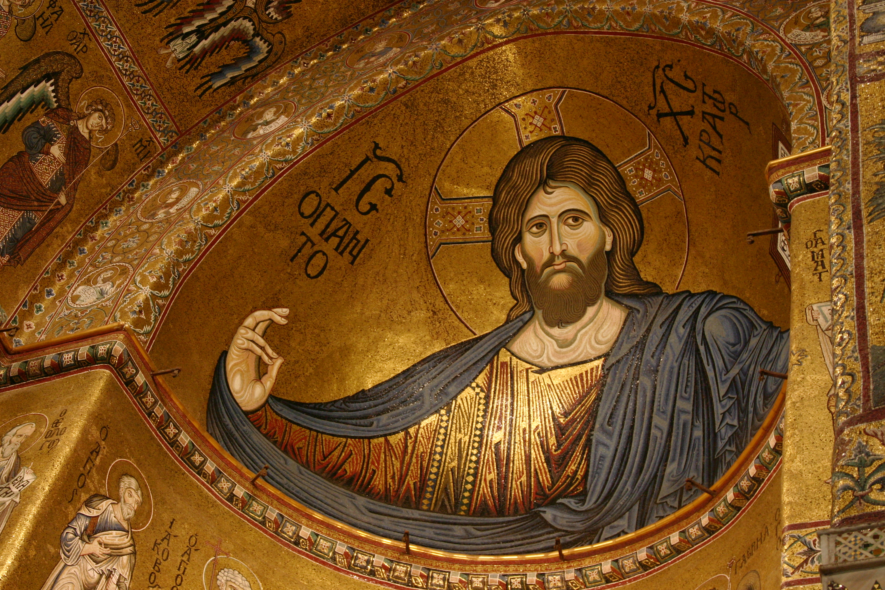 Cathedral of Monreale